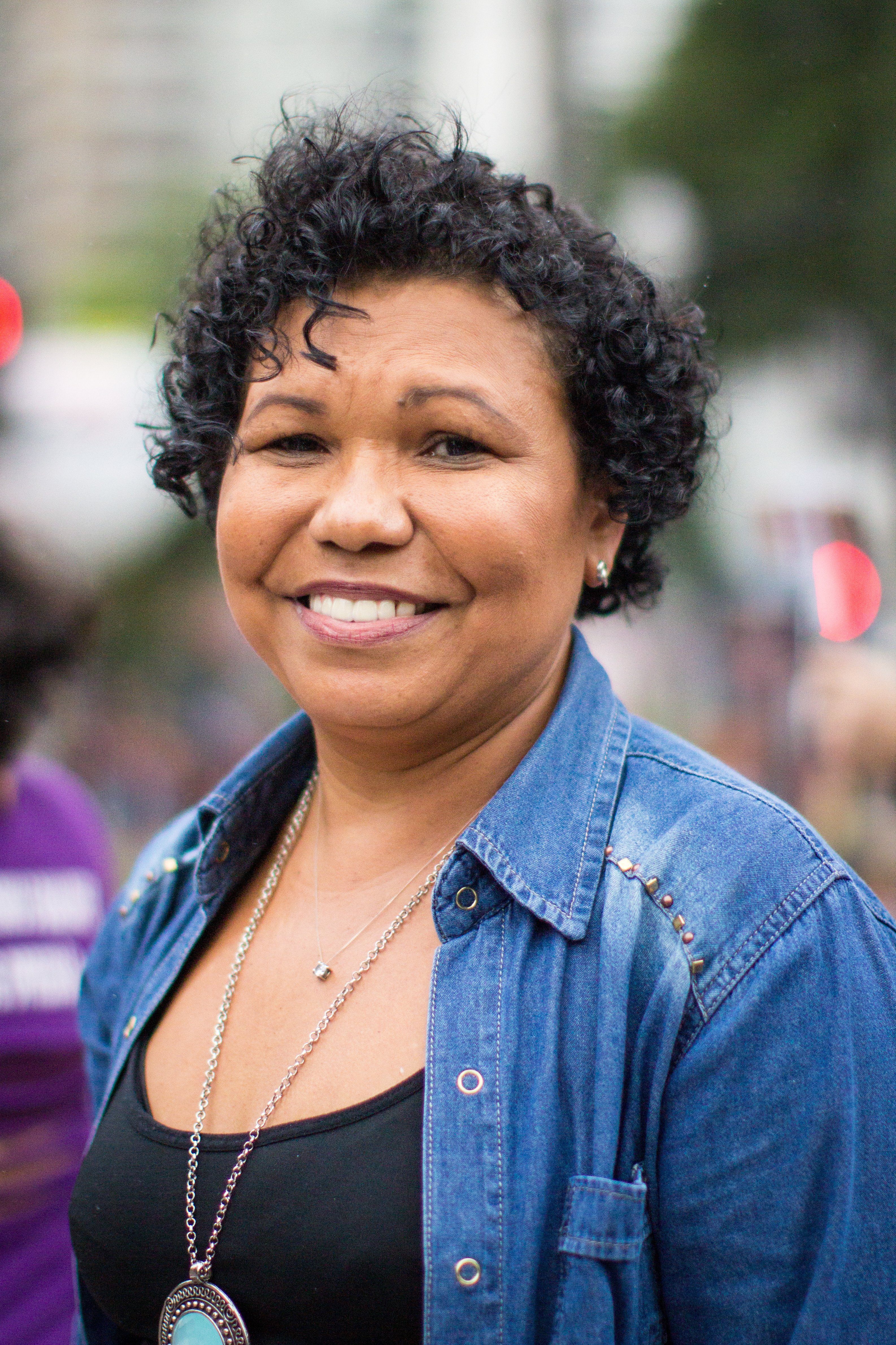 Vera Lúcia, candidata do PSTU à presidência da República do Brasil em 2018.